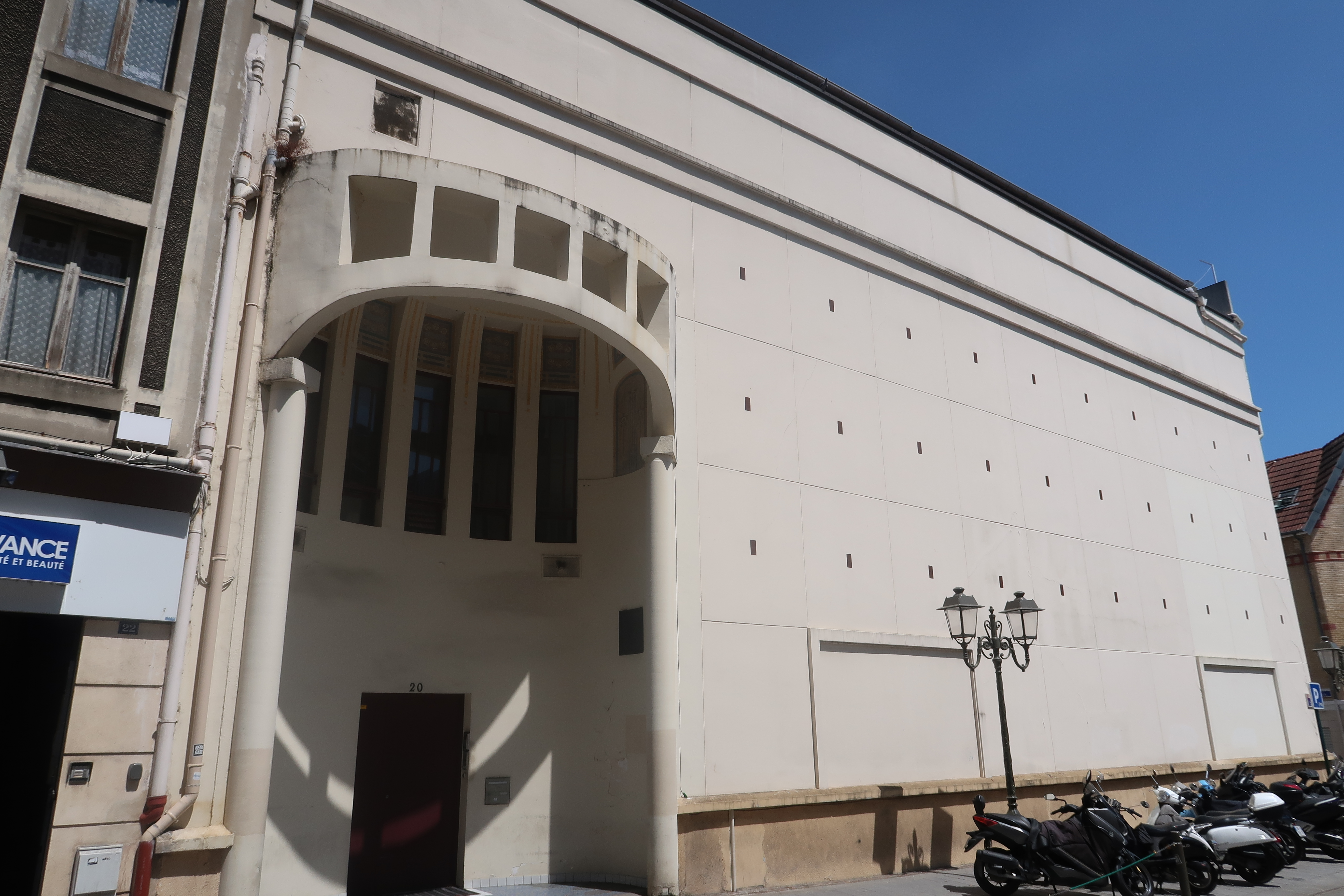 Studio Guillaume Tell, 20 avenue de la Belle-Gabrielle à Suresnes (Hauts-de-Seine).